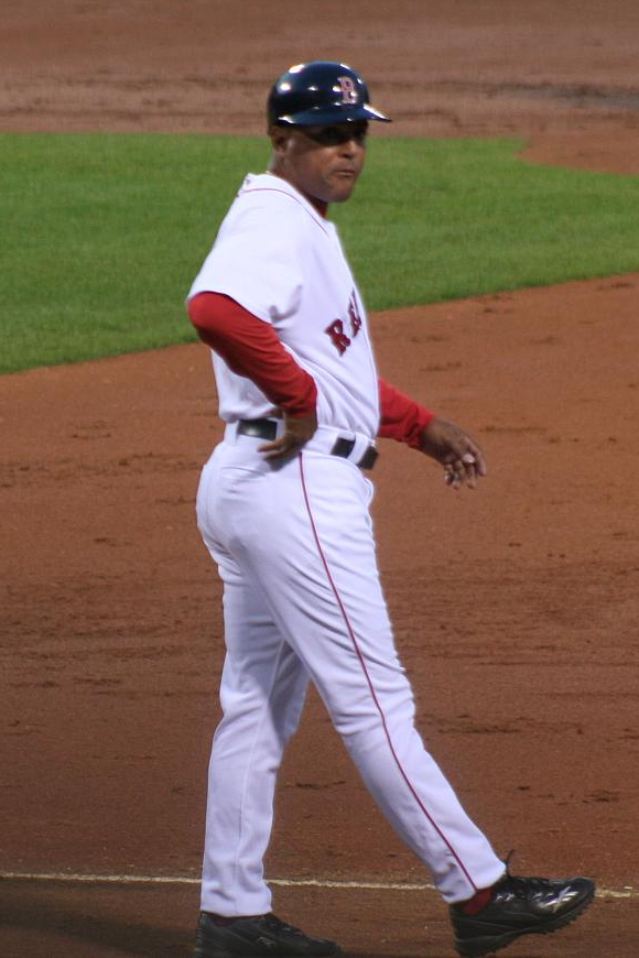 Luis Alicea